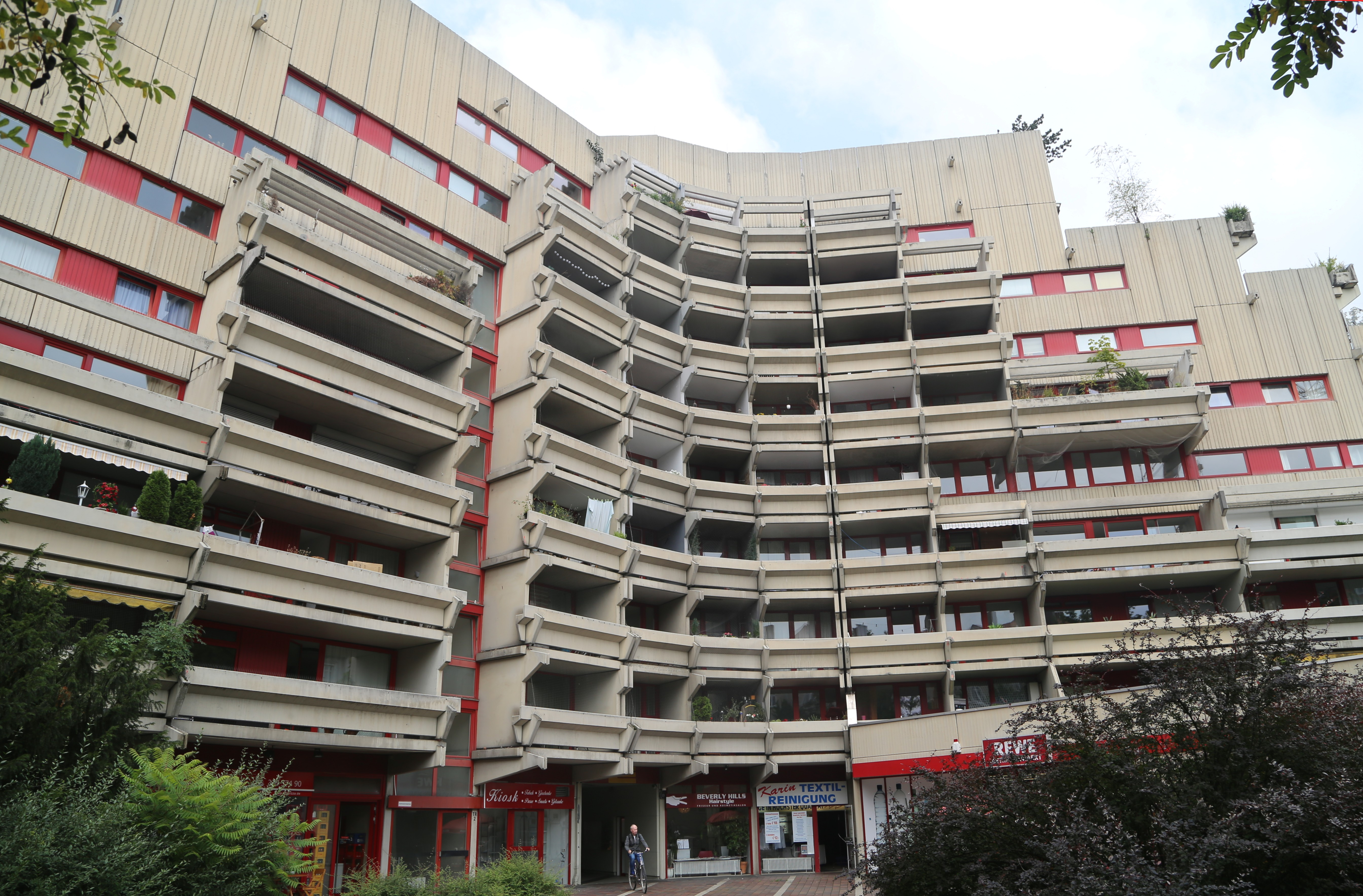 Ungererstraße 19, München, Wohnhochhaus, Wohn- und Geschäftshaus Fuchsbau, dreiarmiger, pyramidal gestaffelter Terrassenbau mit neun Geschossen in Sichtbeton und markanten Balkonen aus Betonfertigteilen, mit nördlich auf polygonalem Grundriss vorgezogener Ladenzone, Wohnungen in 15 verschiedenen Varianten, gemeinschaftlicher Dachterrasse mit Schwimmbecken und Außenflächen, von Wilhelm Steinel, 1972/73.